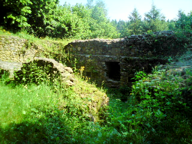 Tzv. rytířský sál.